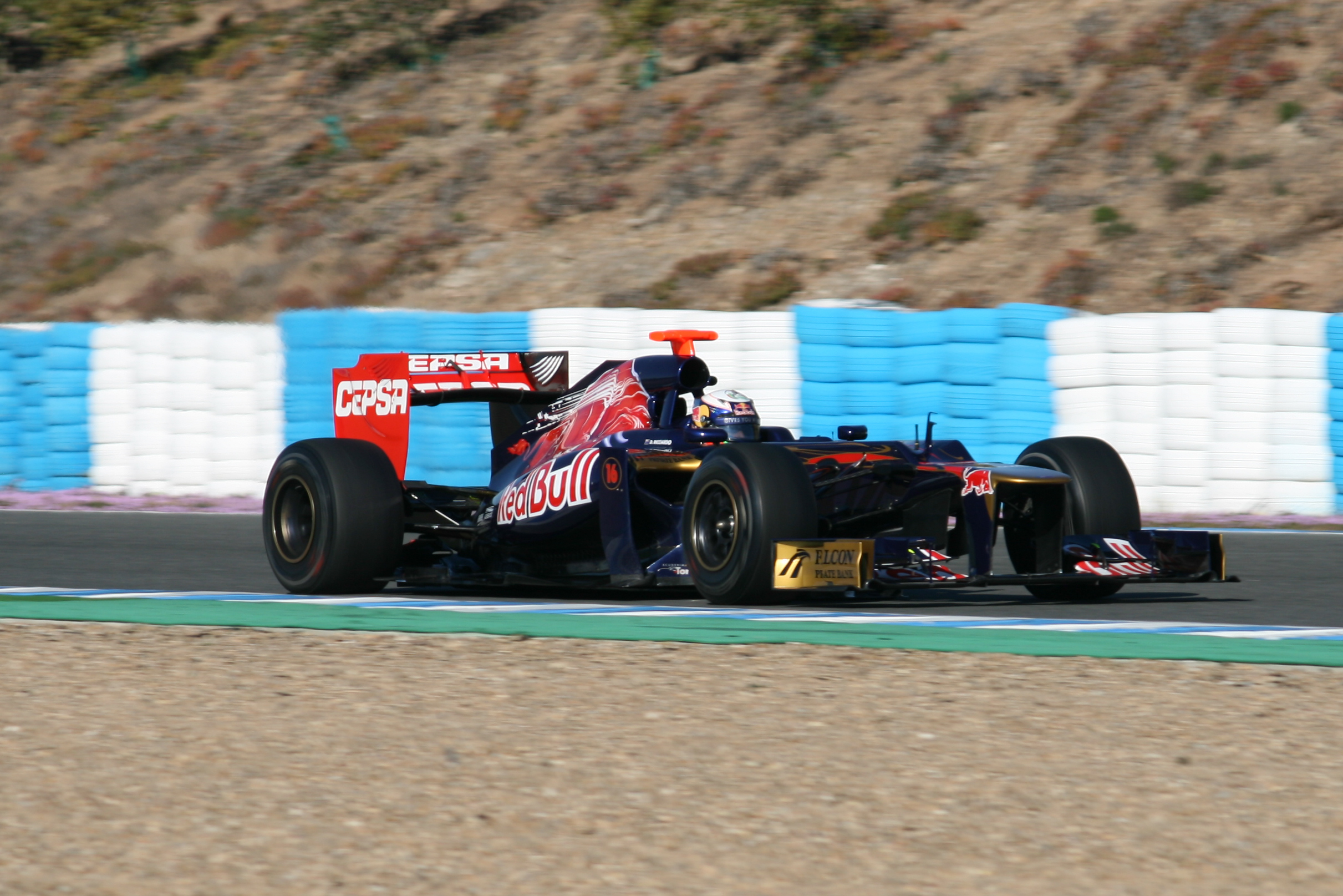 Toro Rosso STR7